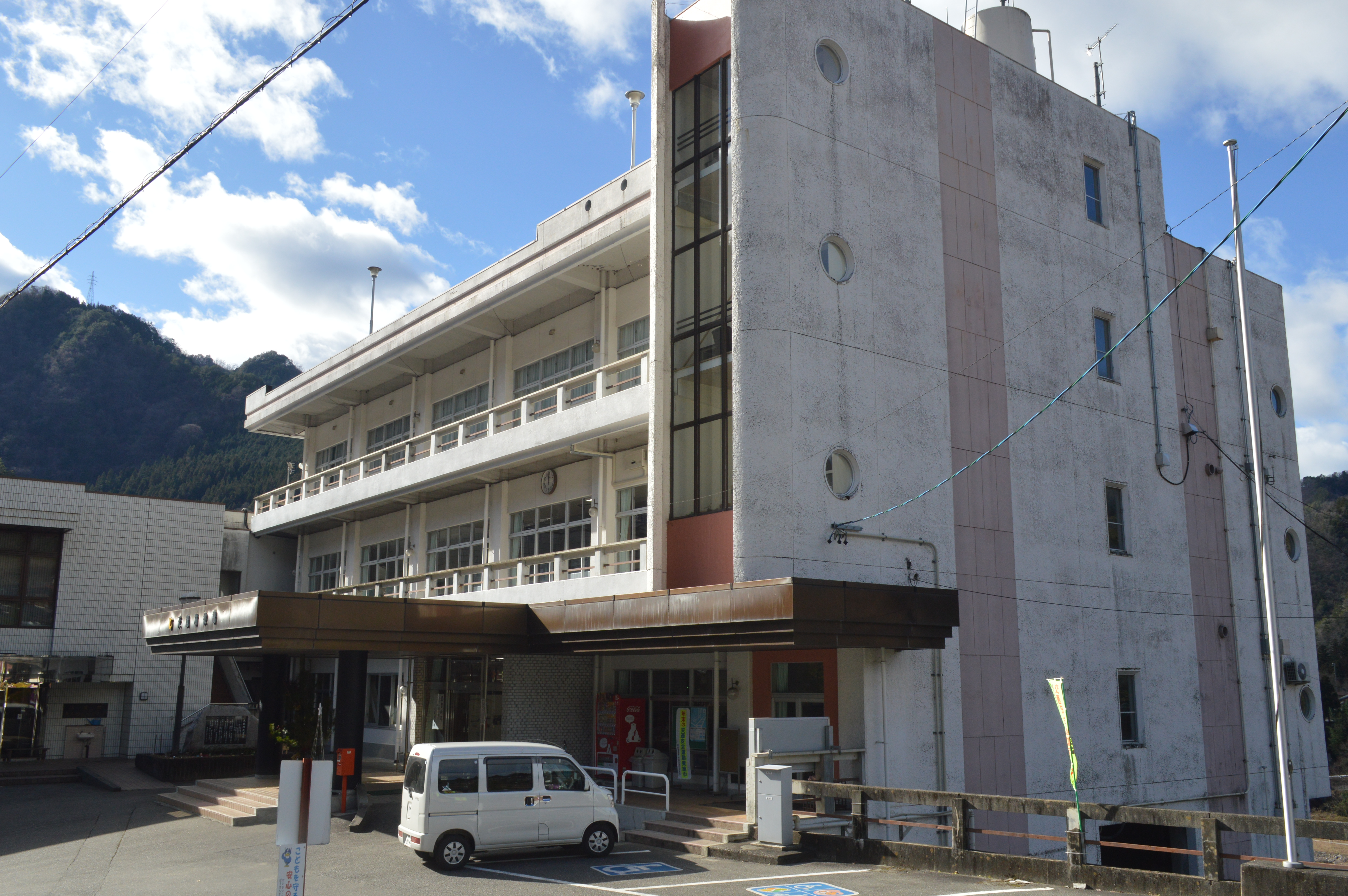 長野県下伊那郡天龍村の天龍村役場。